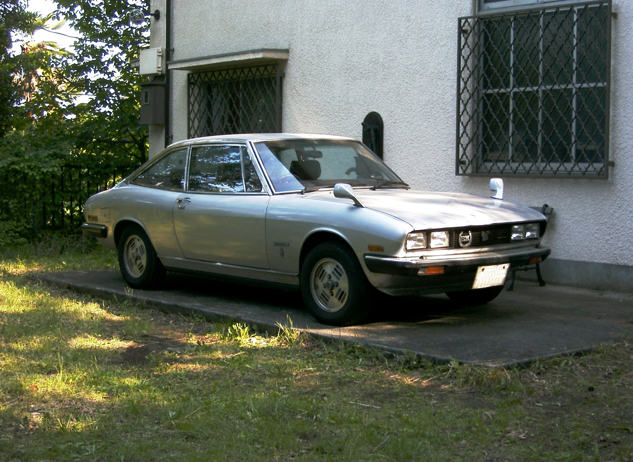 Isuzu-117Coupe 1800XＧ